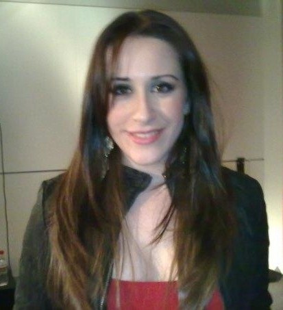 Estrella en la presentación de Black Flamenco en Fnac Málaga.